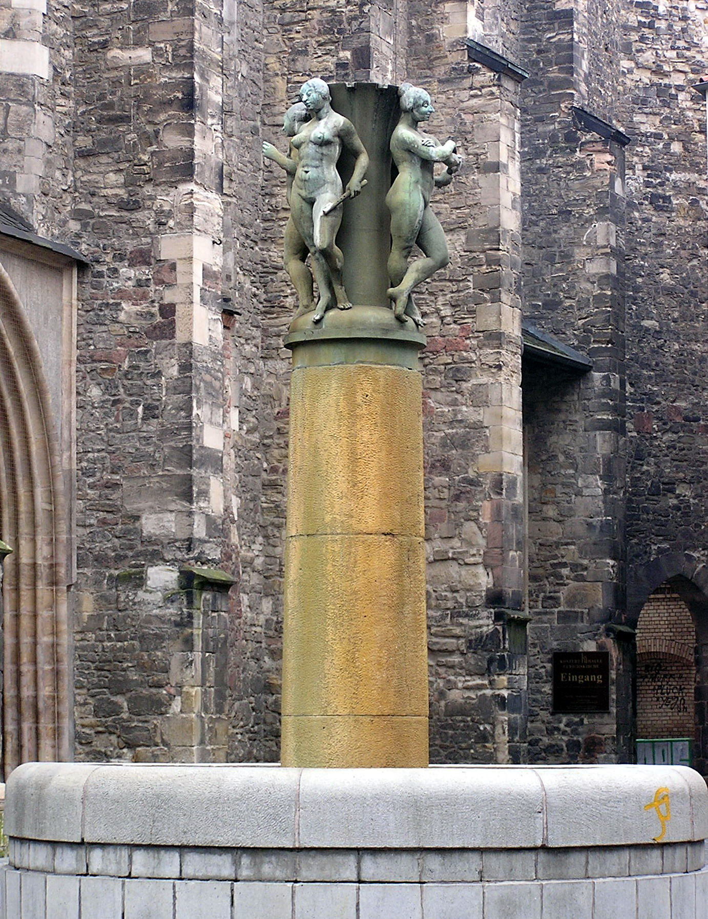 Musenbrunnen